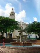 Iglesia El Pital.